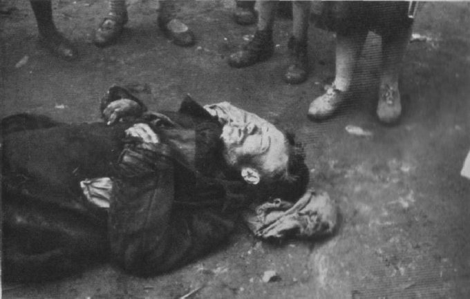 Фото часів Голодомору 1932-1933 рр